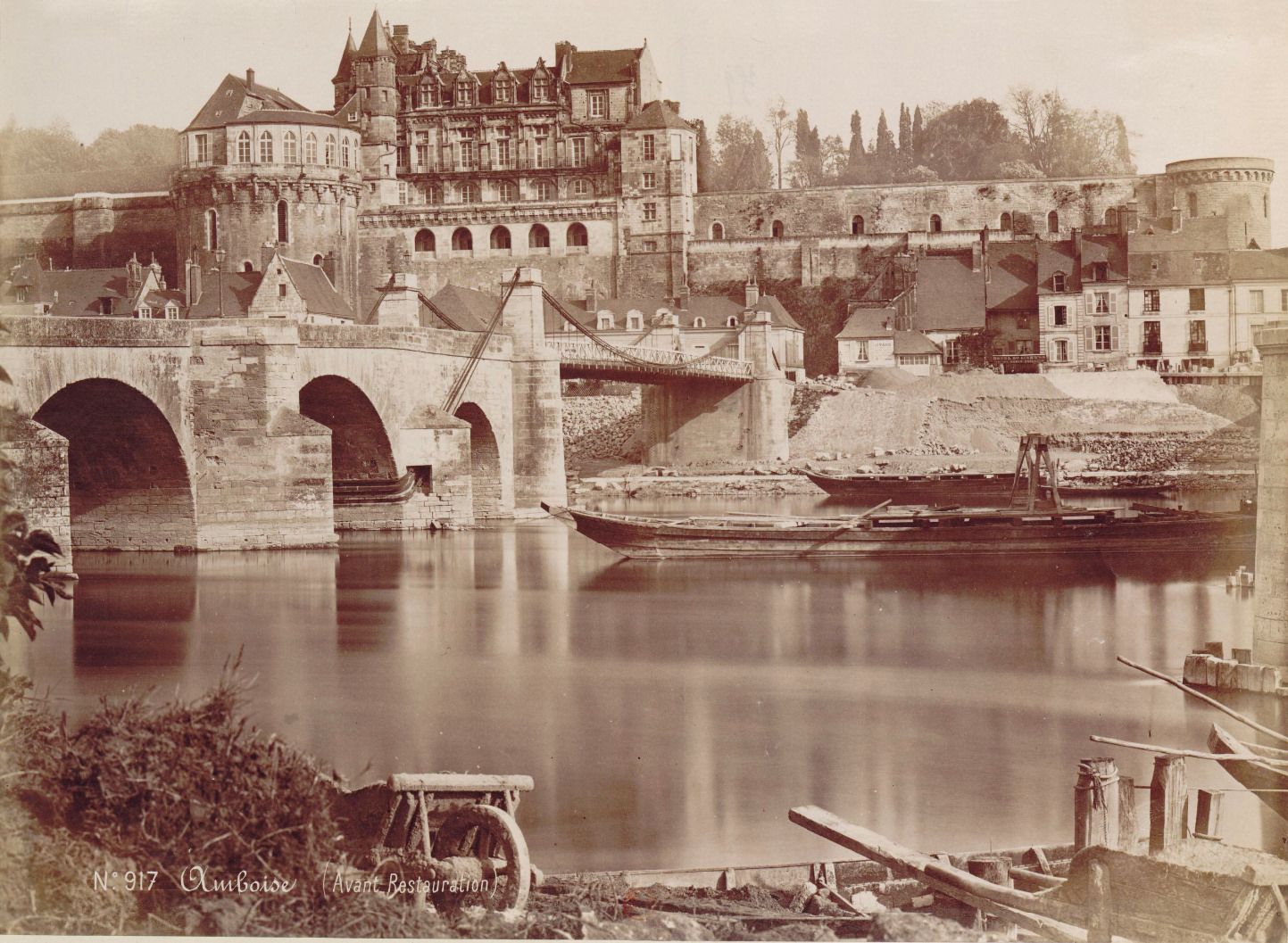 Schloss Amboise vor der Restaurierung durch die Architekten Ruprich-Robert